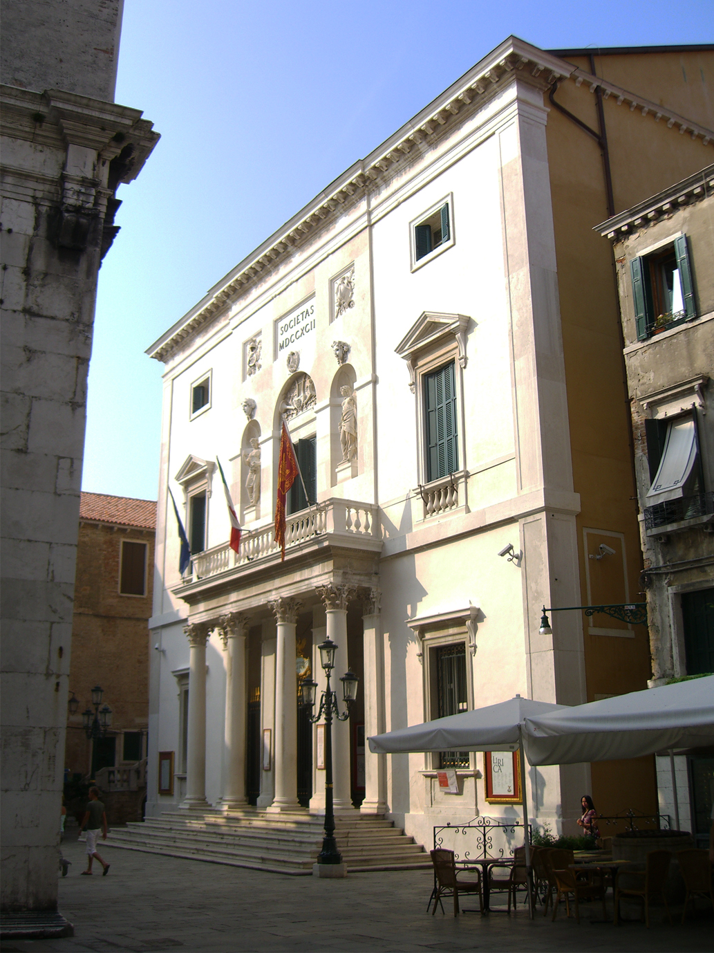 Teatro La Fenice, Venezia, Italia